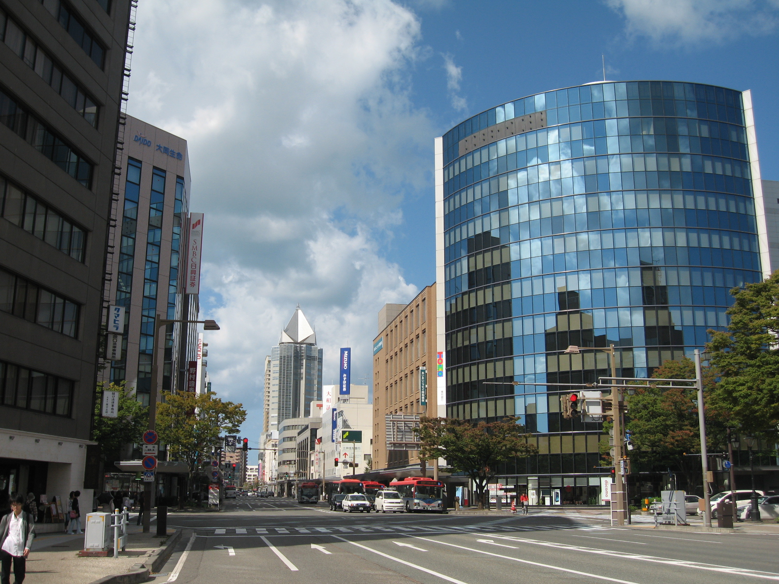 新潟市中央区。柾谷小路の画像。